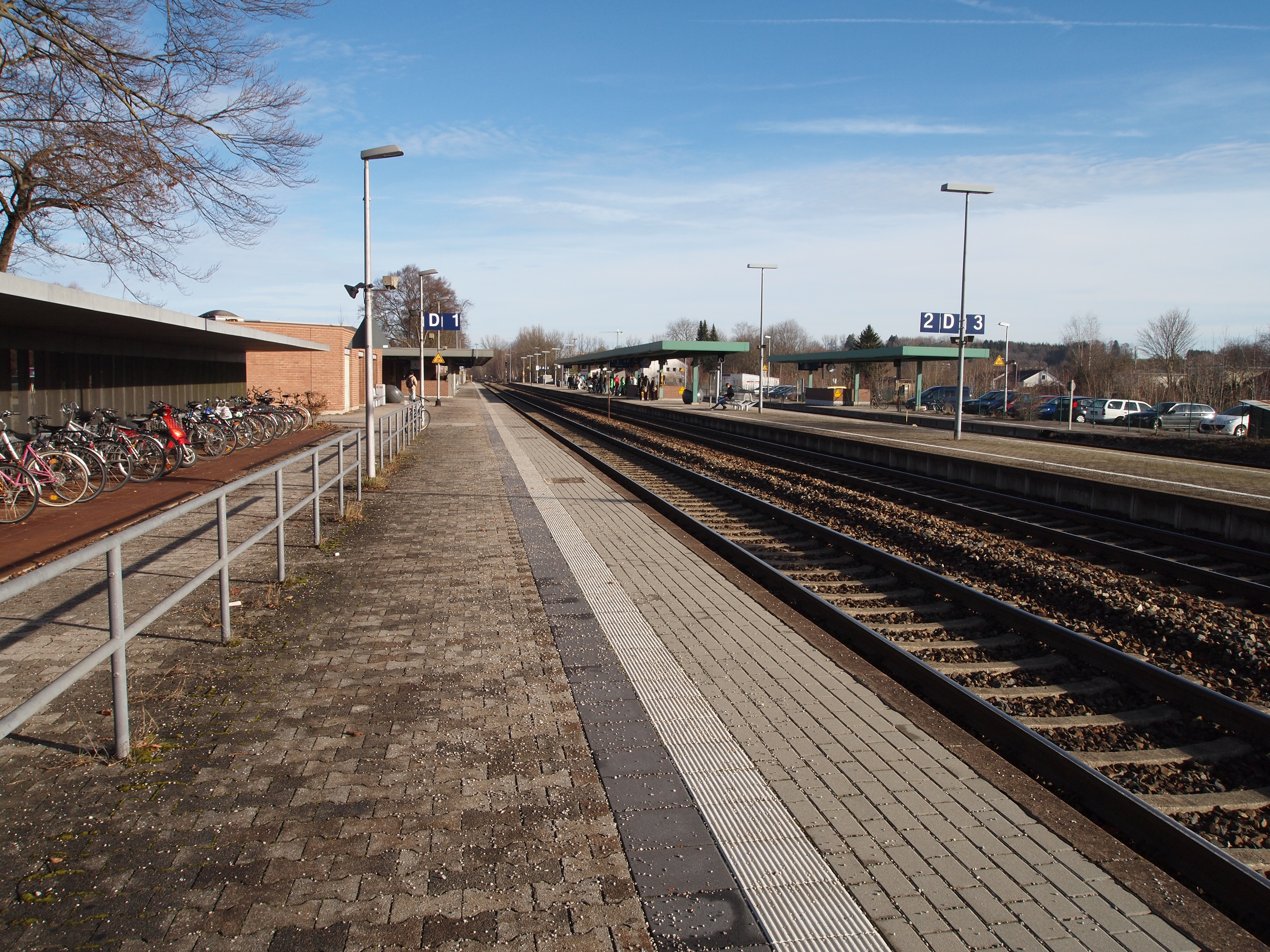 Bahnhof Kaufbeuren, Gleis 1-4